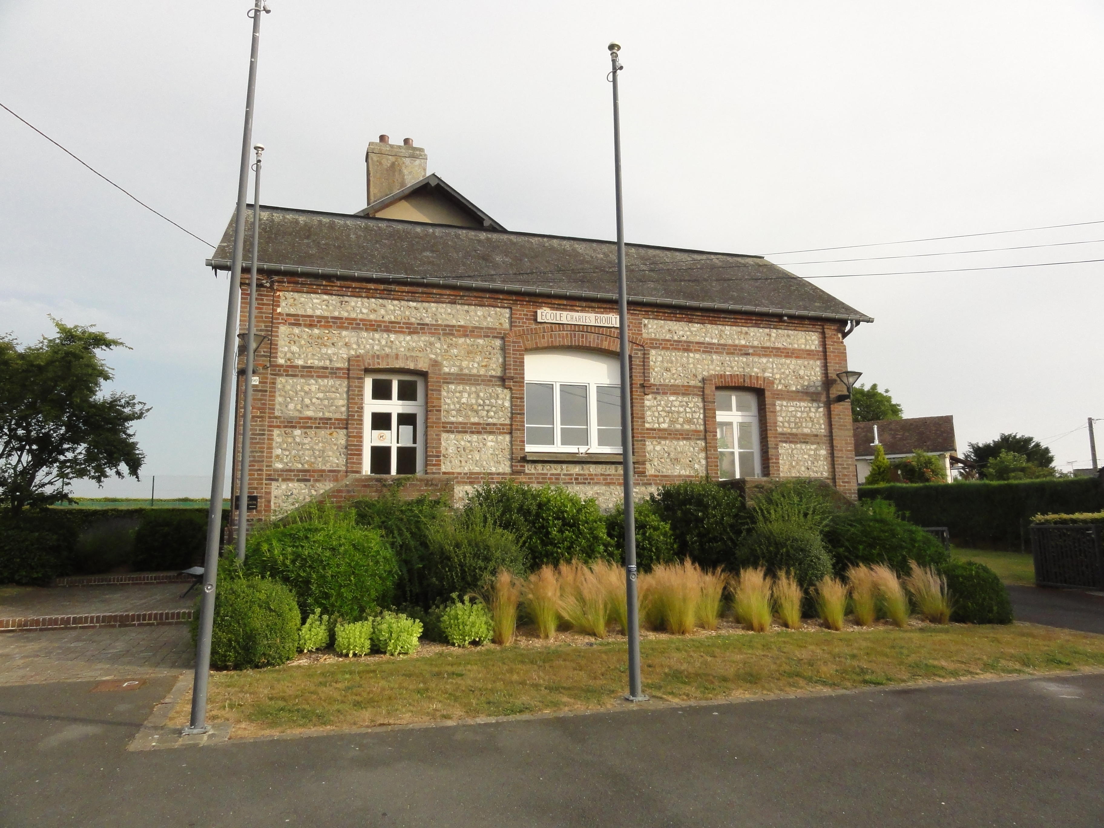 Auzouville-Auberbosc (Seine-Mar.) école